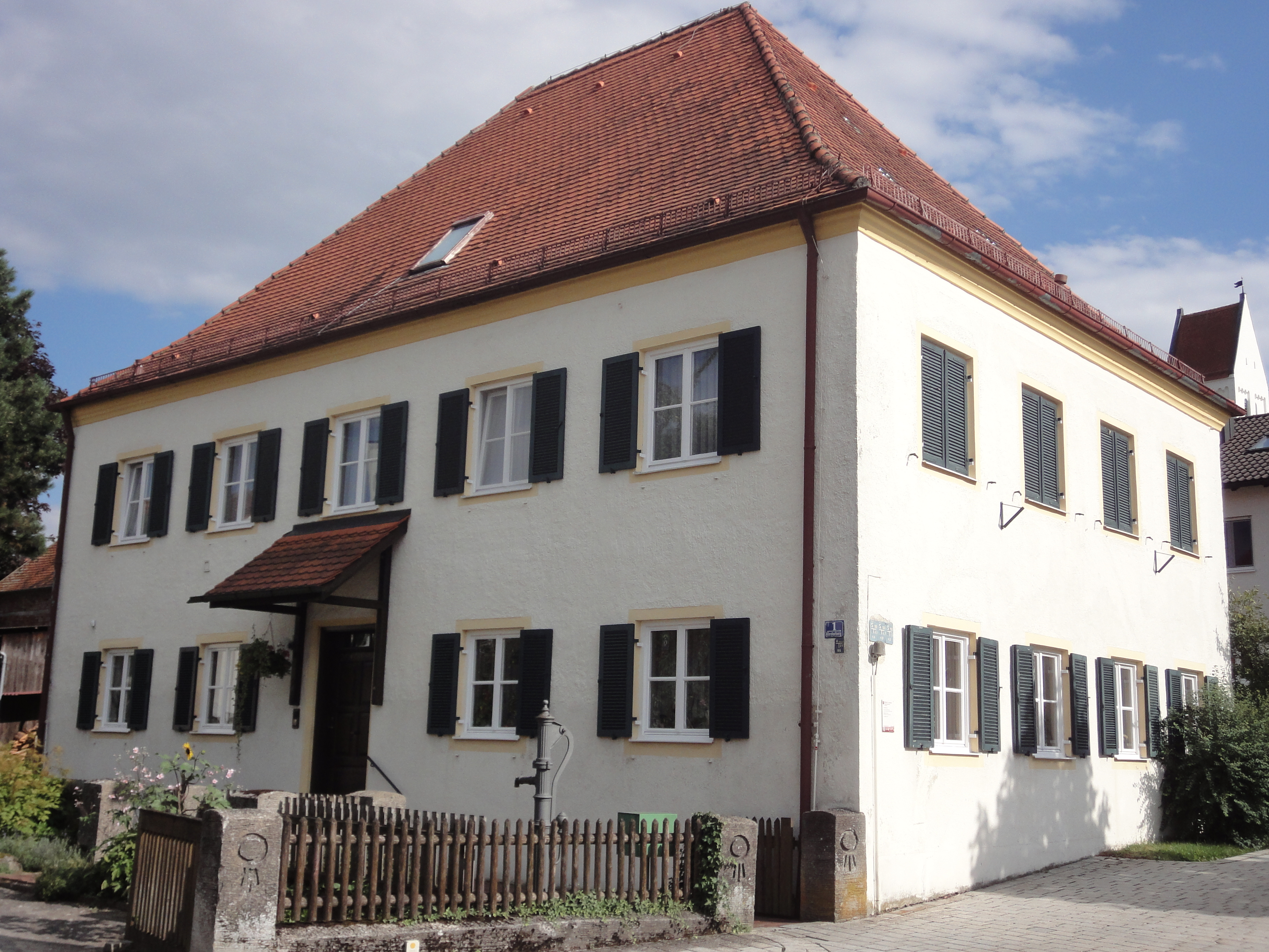 ehem. Klosterrichterhaus, jetzt Pfarrhaus, zweigeschossiger Walmdachbau, 18. Jahrhundert